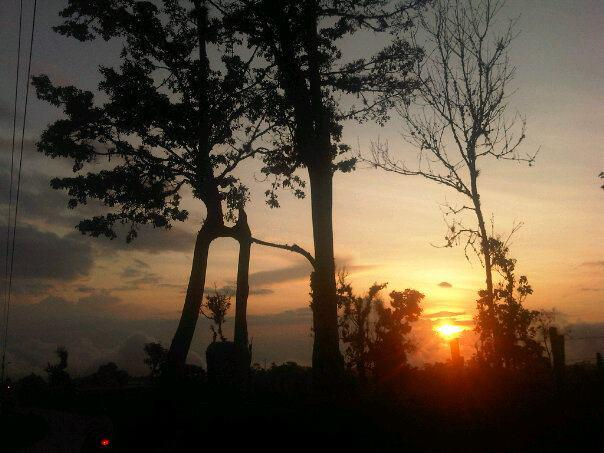 Esta fotografía fue tomada en el municipio colombiano con código 68377.